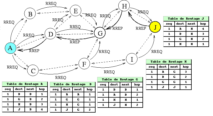 Schéma de détéction de routes par AODV et etablissement des tables de routage